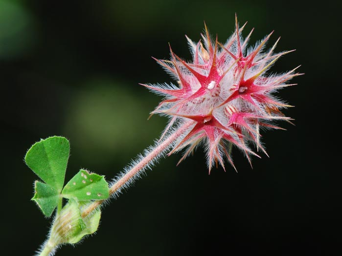 Trifolium stellatum, Trèfle étoilé, Corse du sud